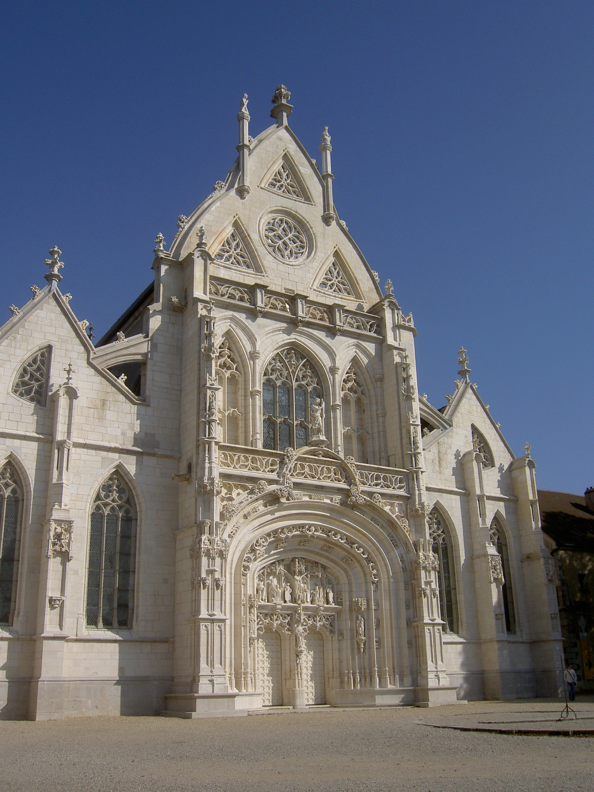 Eglise de Brou à Bourg-en-Bresse